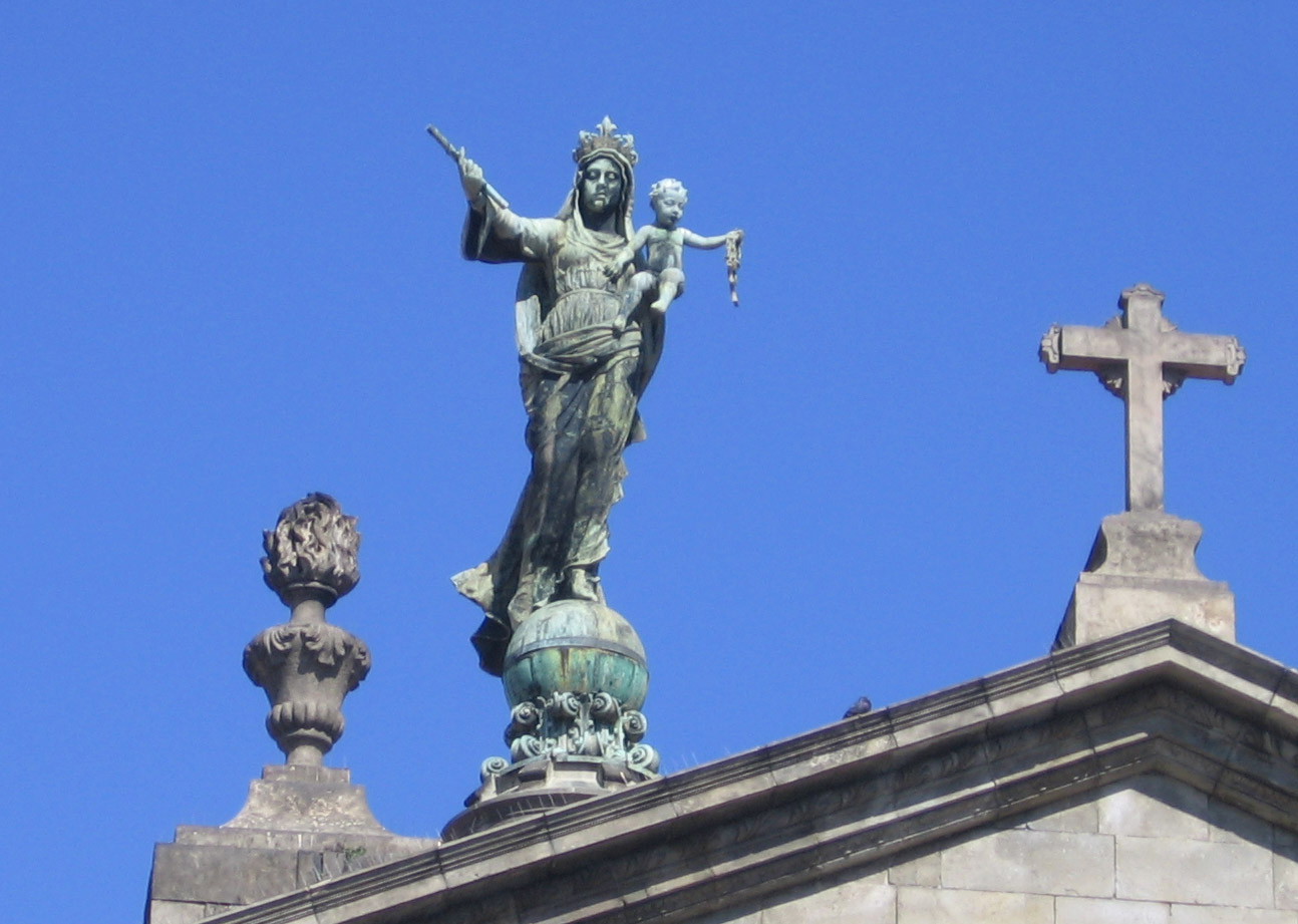 Merced (1959), de Miquel y Llucià Oslé, Basílica de la Merced.